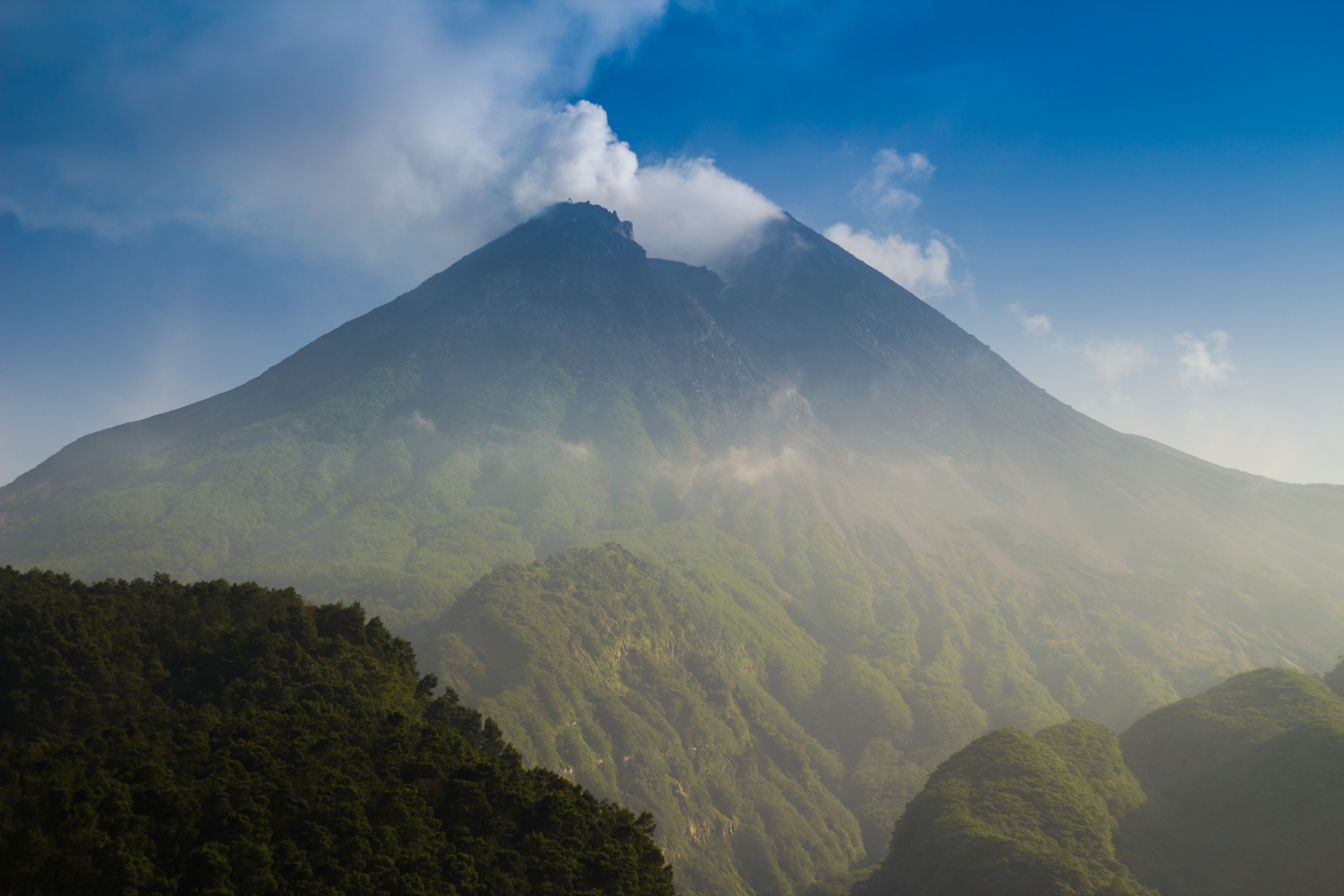 Gunung Merapi dilihat dari Kaliadem yang merupakan sisi selatan dari gunung Merapi. waktu pagi hari merupakan waktu yang sangat tepat untuk melihat gunung ini sebelum tertutup oleh awan.